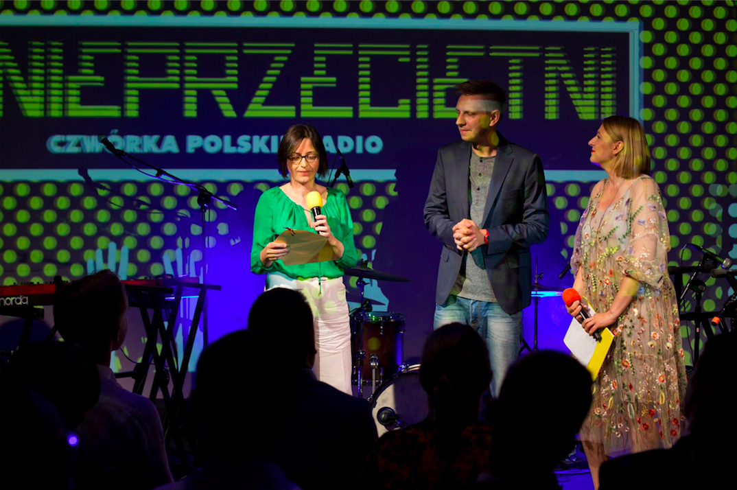 gala plebiscytu "Nieprzeciętni 2018" Czwórki Polskiego Radia, prowadzący